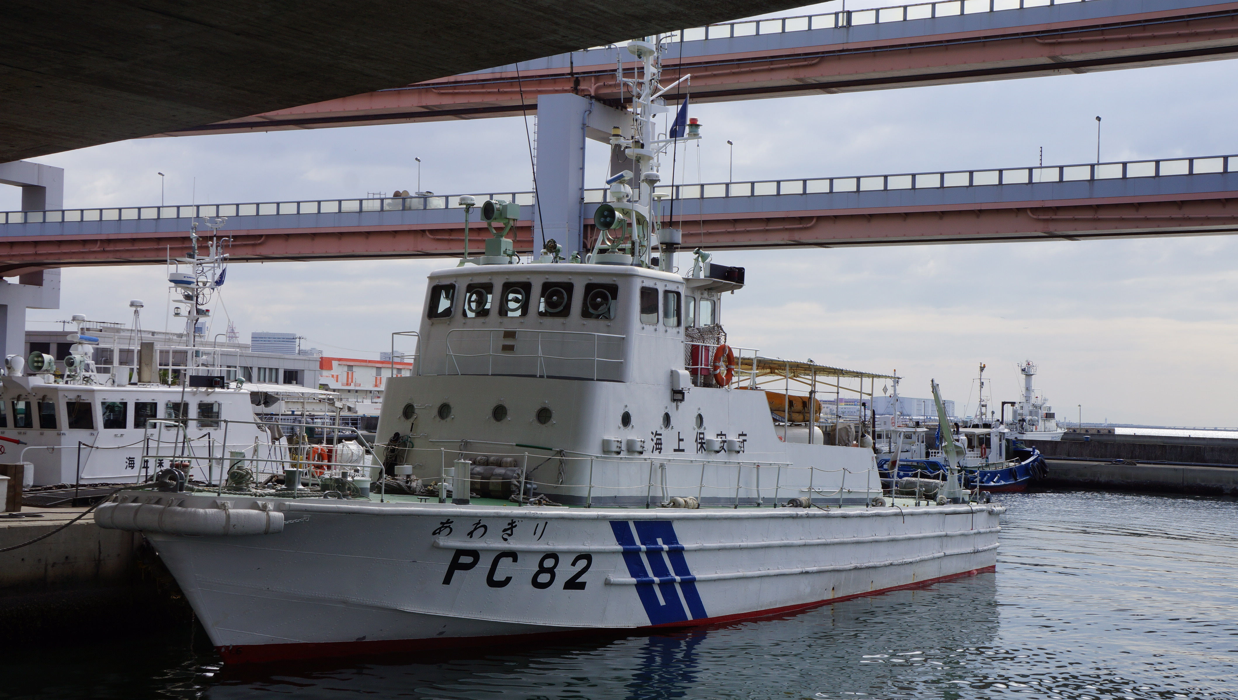 海上保安庁 巡視艇あわぎり。2012年11月10日 神戸港にて撮影